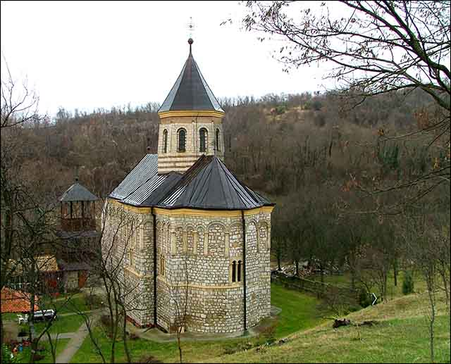 Le monastère de Mala Remeta, fondé par le roi Stefan Dragutin, est un des 16 monastères de la Fruška Gora